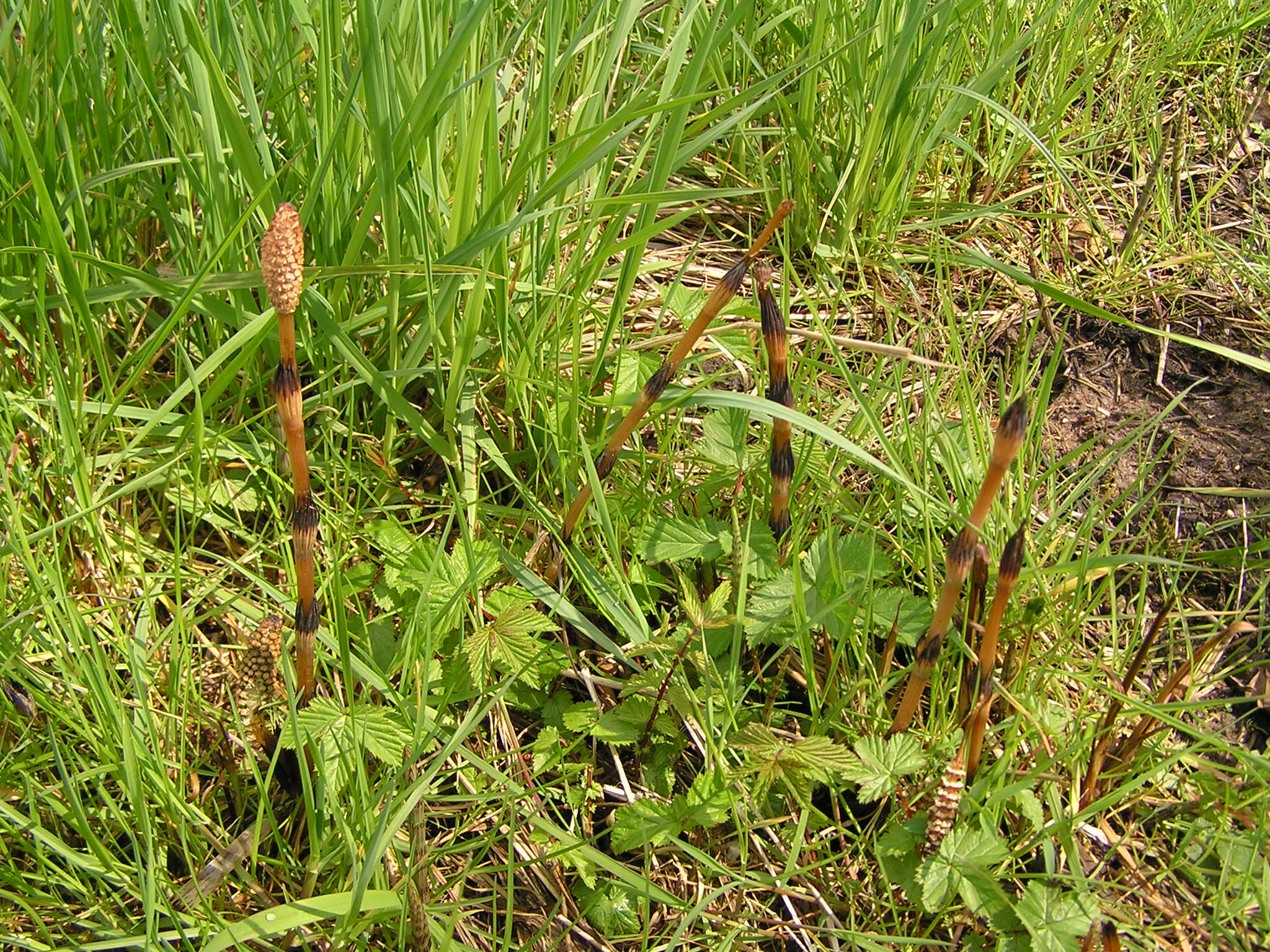 Equisetum arvense (Charente maritime, France)